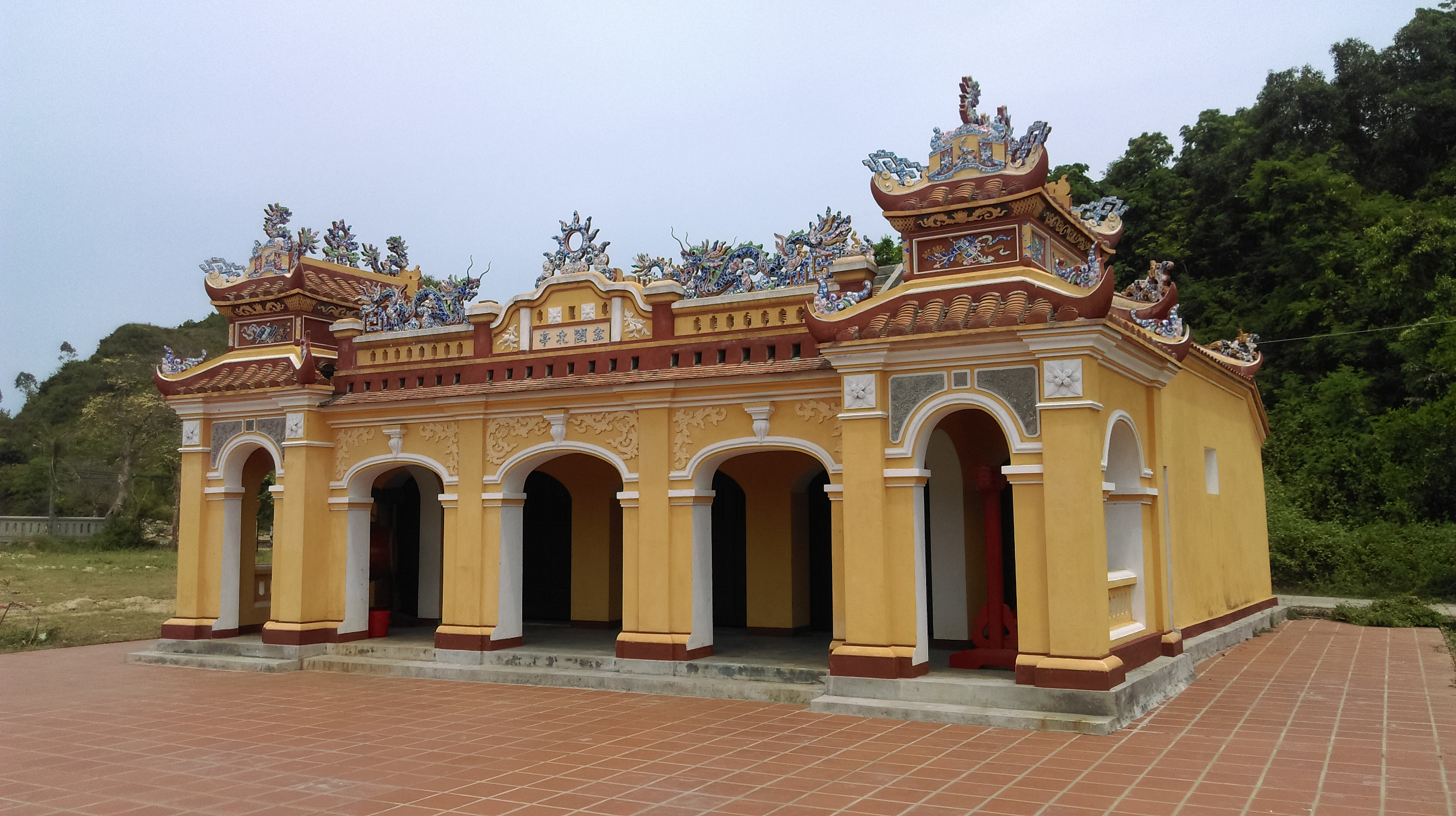 Đình Khuê Bắc, Hòa Hải, Ngũ Hành Sơn, Đà Nẵng